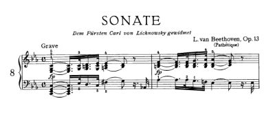 Extracto de la sonata patética de Beethoven